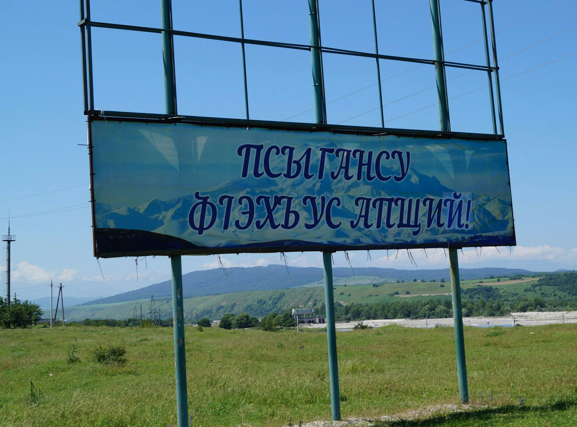 Таблоид перед въездом в Псыгансу